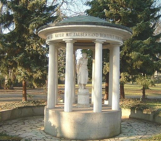 Friedrich-Karl-Sprudel Brunnentempel im Kurpark am Kurhaus, Bad Vilbel